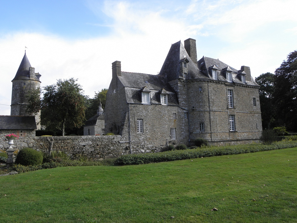 Vue méridionale du château de La Haye, sa tour et sa chapelle, en Saint-Hilaire-des-Landes (35). .